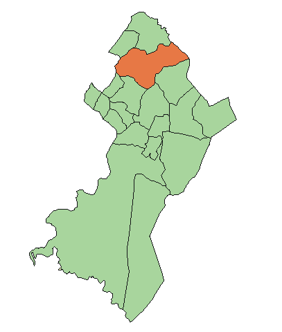 Ubicación de Luque.